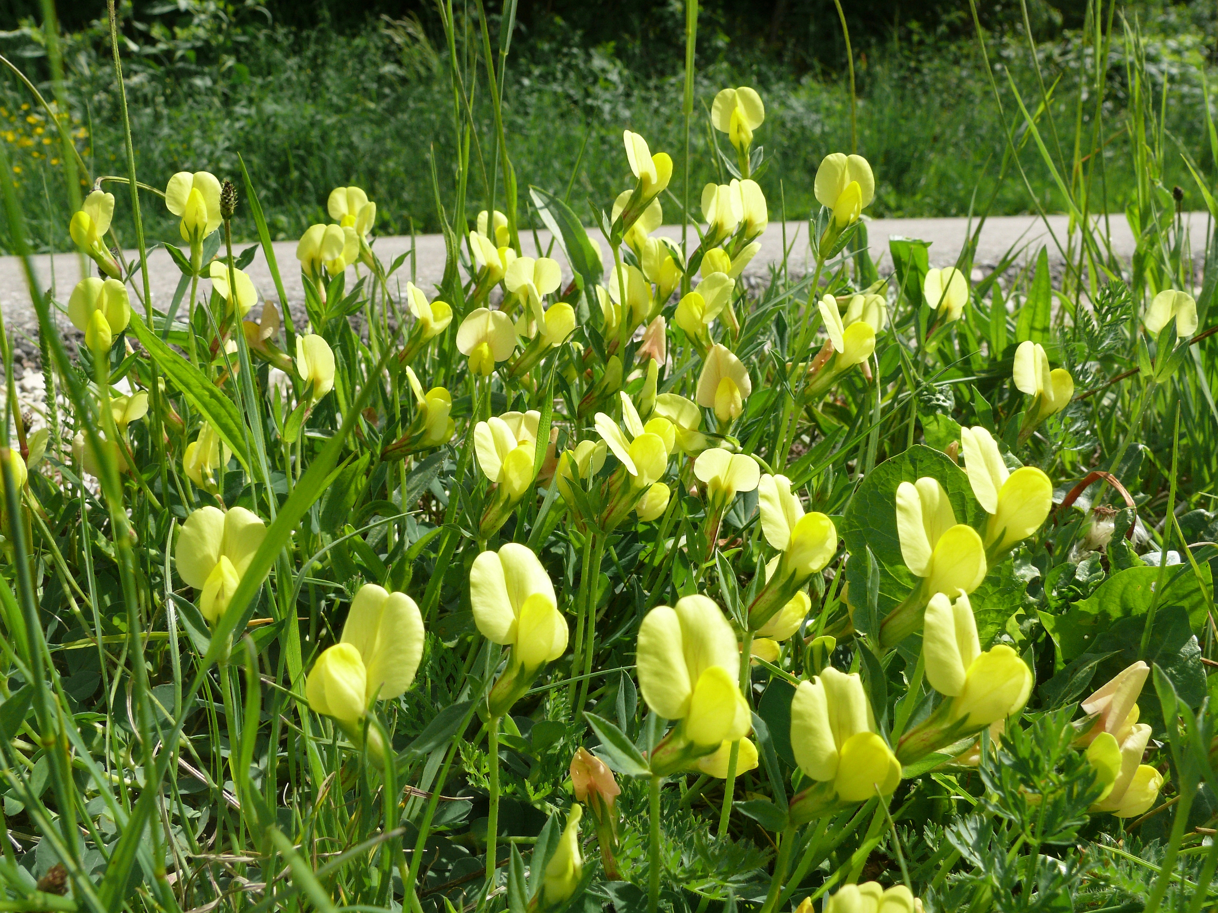 Lotus maritimus, Baaralb, Deutschland